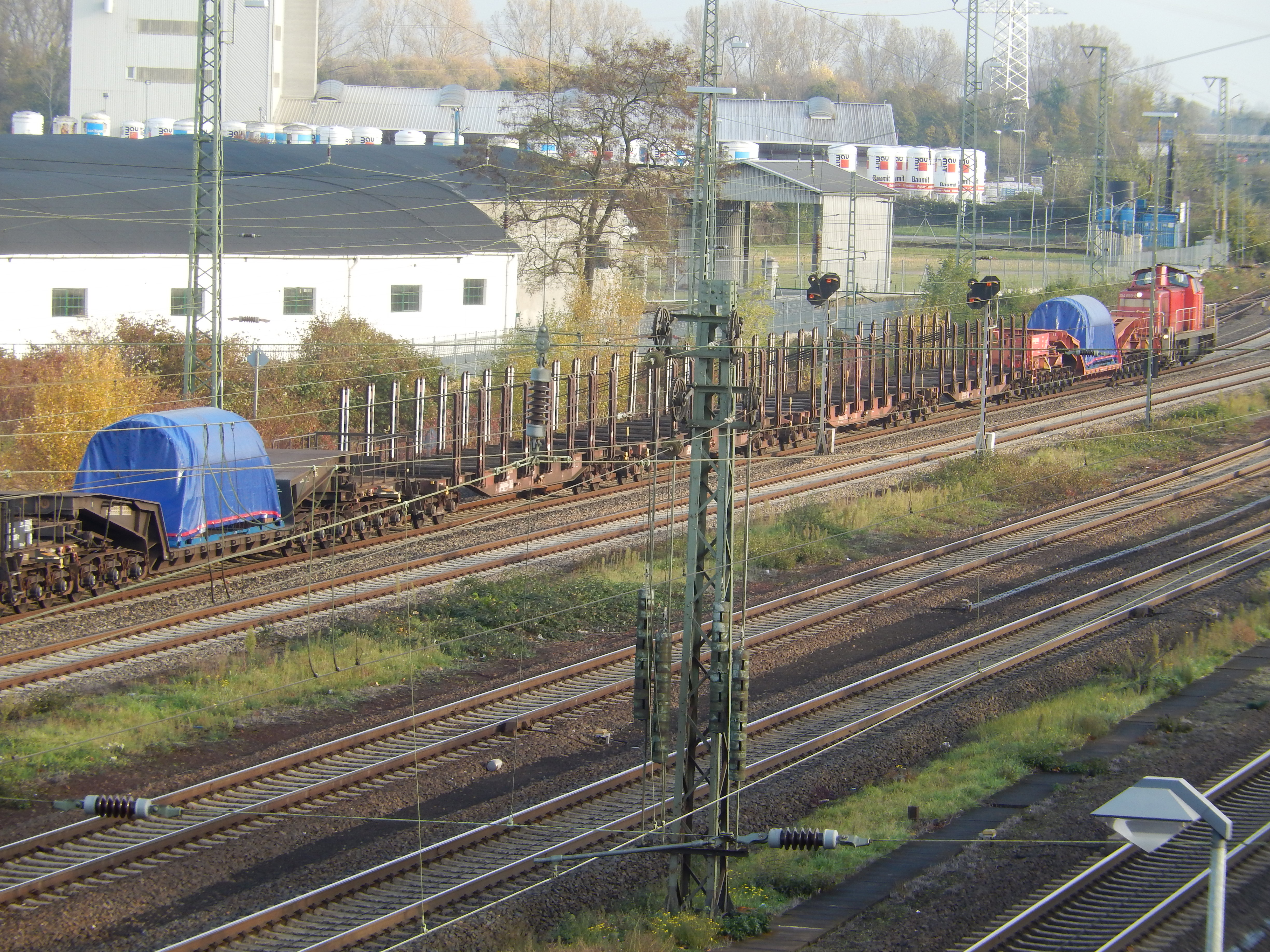 Vier Schutzwagen zwischen zwei Castor-Behältern für den Atommülltransport aus dem stillgelegten Kernkraftwerk Biblis im Bahnhof Biblis.